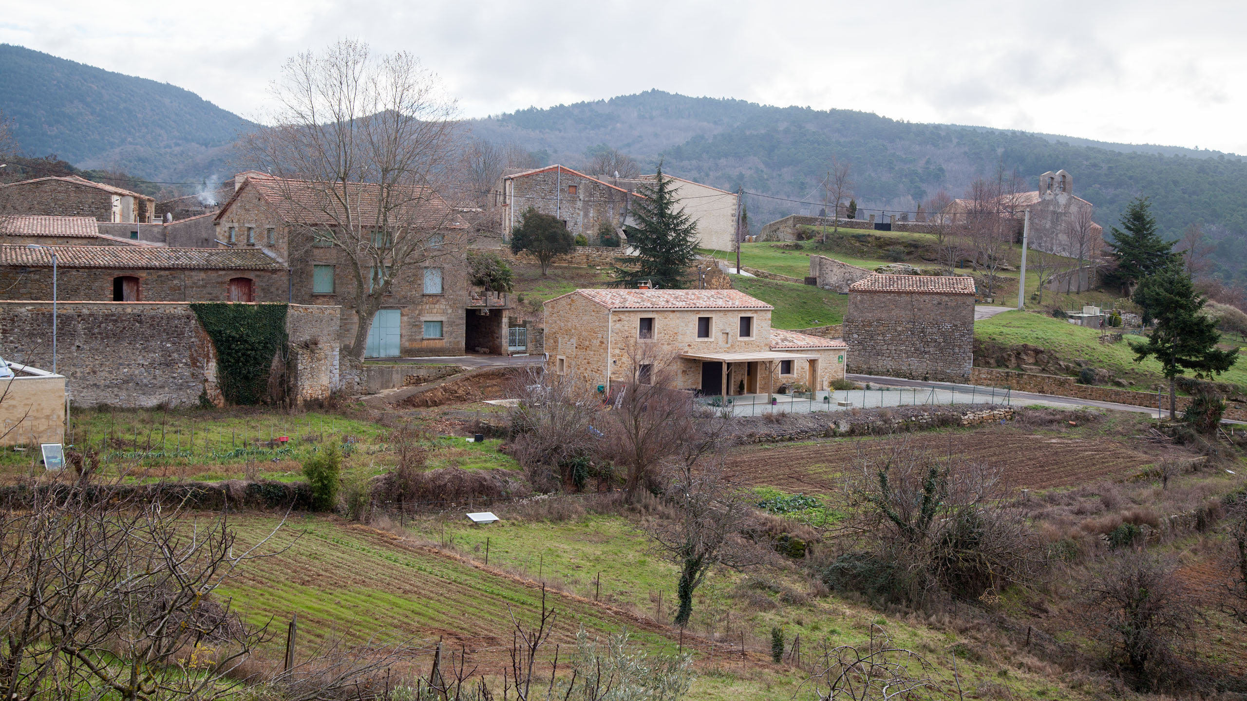 Vue générale